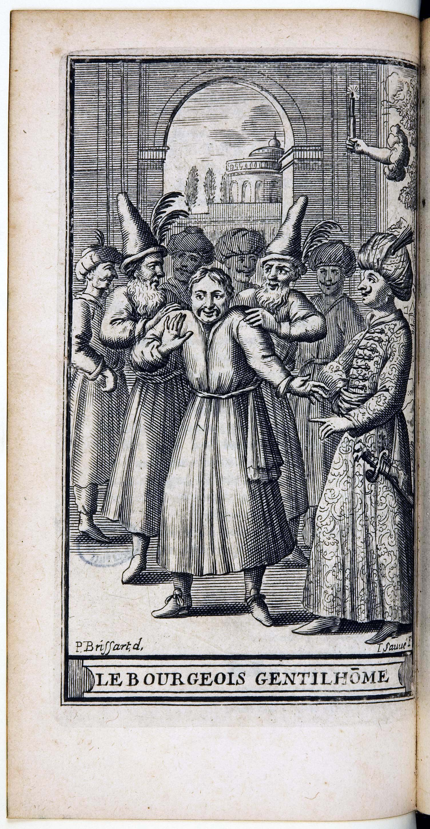 Frontispice du Bourgeois Gentilhomme de l'édition des oeuvres de Molière de 1682.